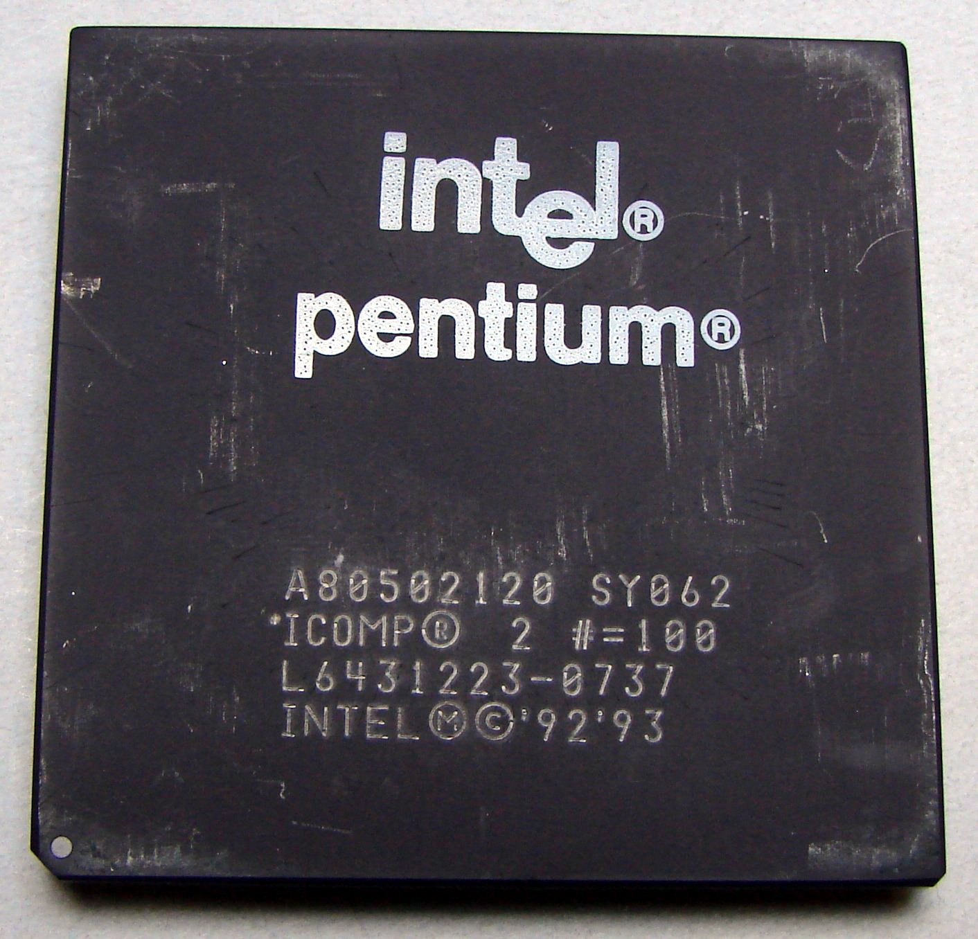 Intel Pentium Processor (frontside)